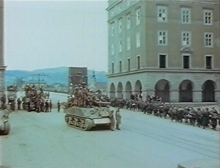 Der Linzer Hauptplatz (nördlicher Ausgang) nach der Ankunft der amerikanischen Truppen Mai 1945, weiss geflickte Fensterglasfelder am Finanzgebäude Ost